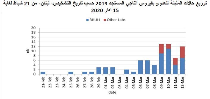 عدد الاصابات في لبنان من ١٥ شباط الى ١٢ اذار